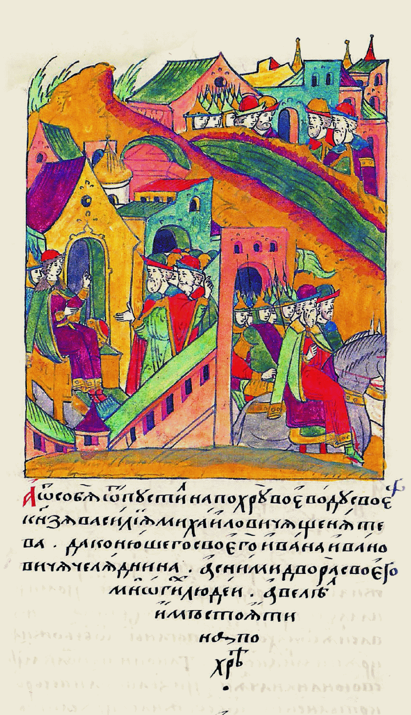 Миниатюра Лицевого летописного свода XVI в.: "а от себя отпустил на Пахру воеводу своего князя Василия Михай- ловича Щенятева да конюшего своего Ива- на Ивановича Челяд- нина, а с ними двора своего многих людей, а велел им стоять на Пахре».